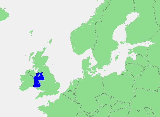 Ierse Zee